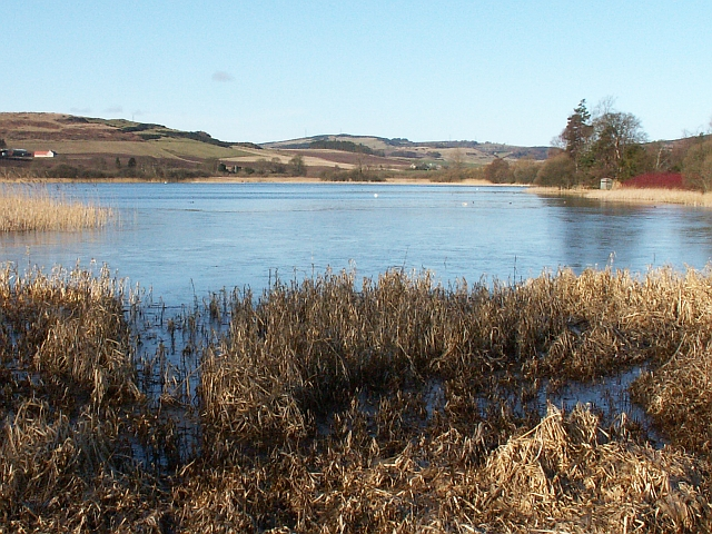 Lindores Loch, Lindores